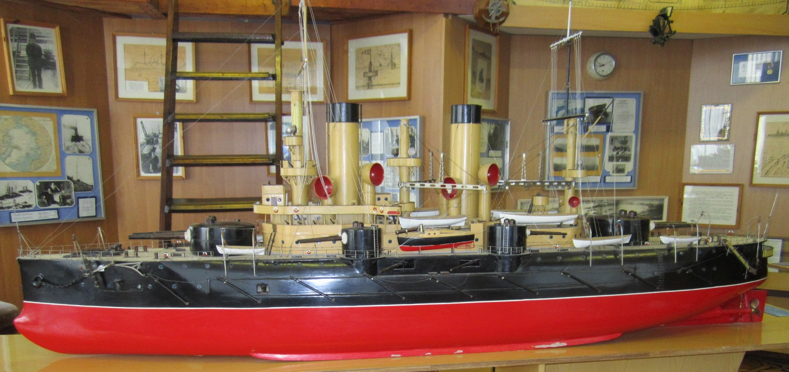 Ермак